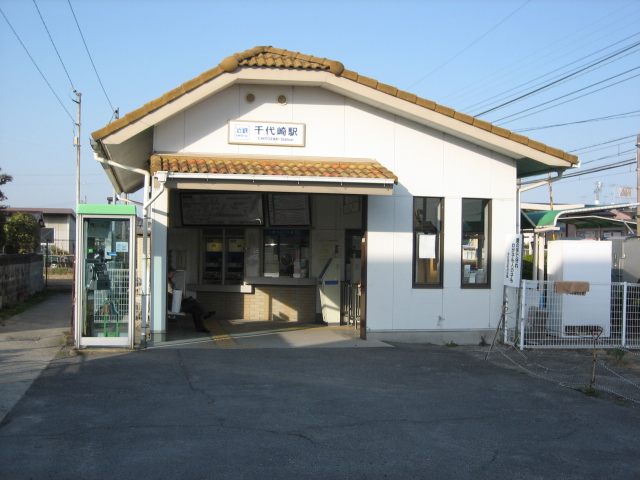 千代崎駅